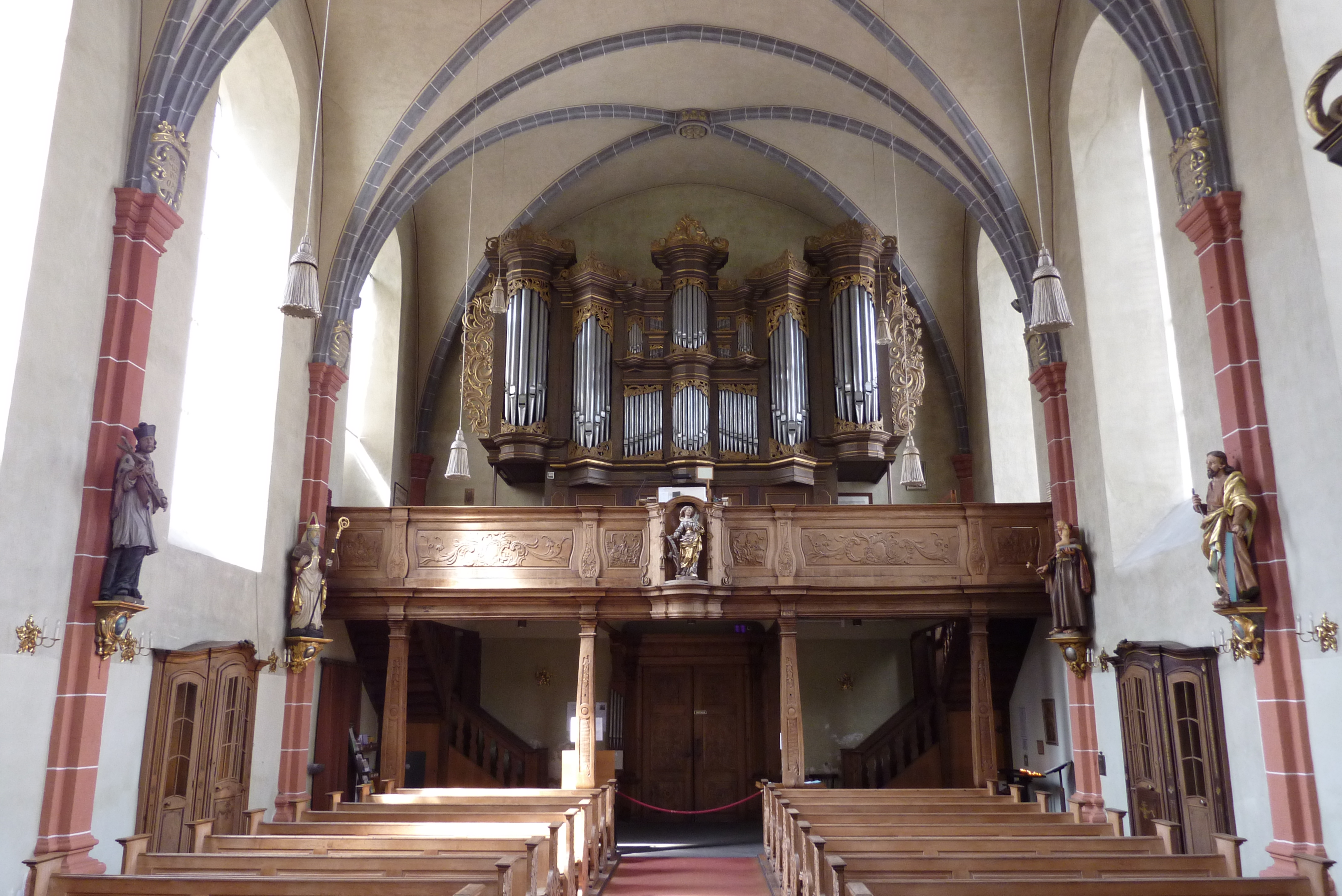 Niederbreisig, Ortsteil von Bad Breisig, Katholische Kirche St. Marien, Innenraum mit Orgel